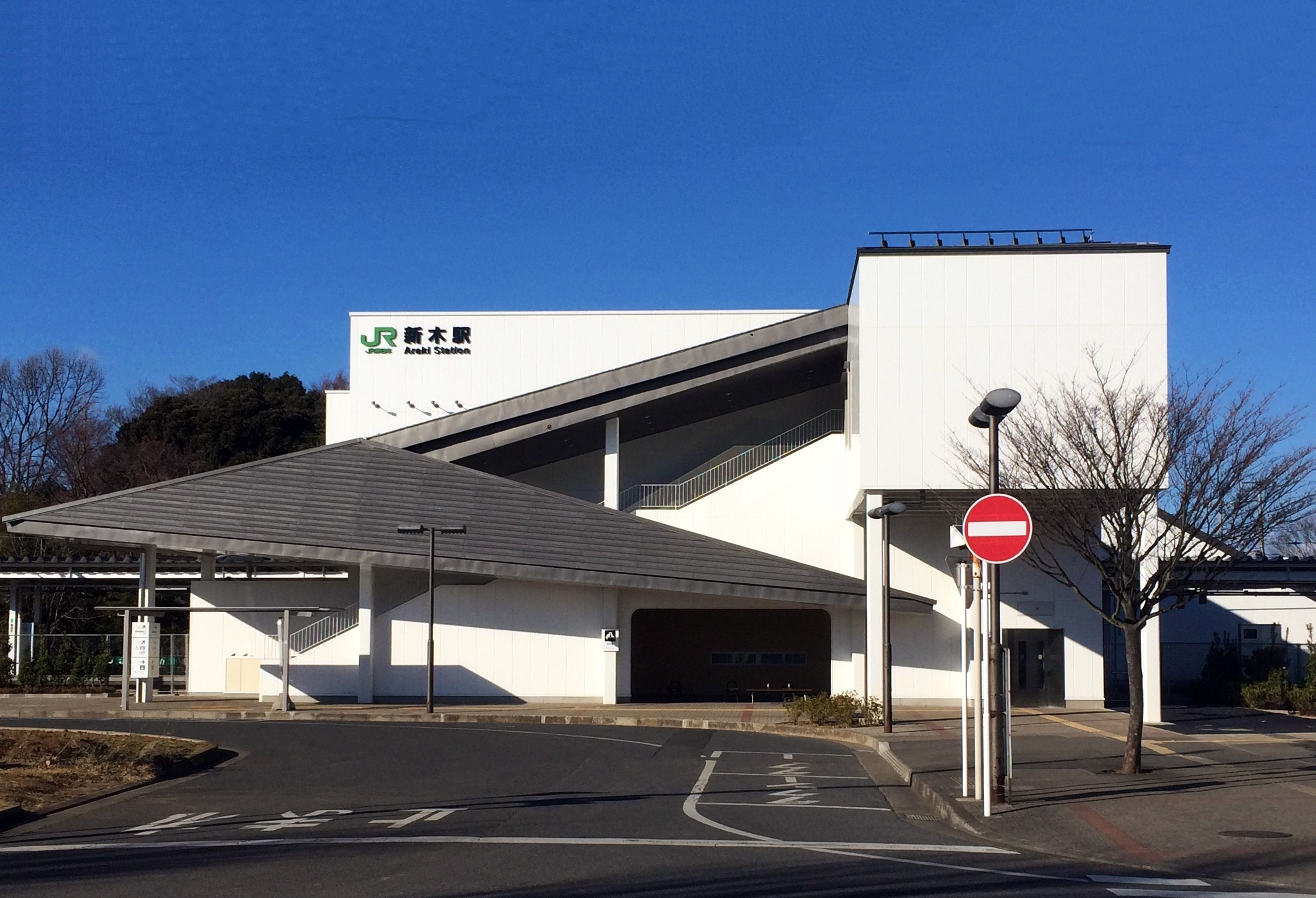 新木駅南口(cropped)